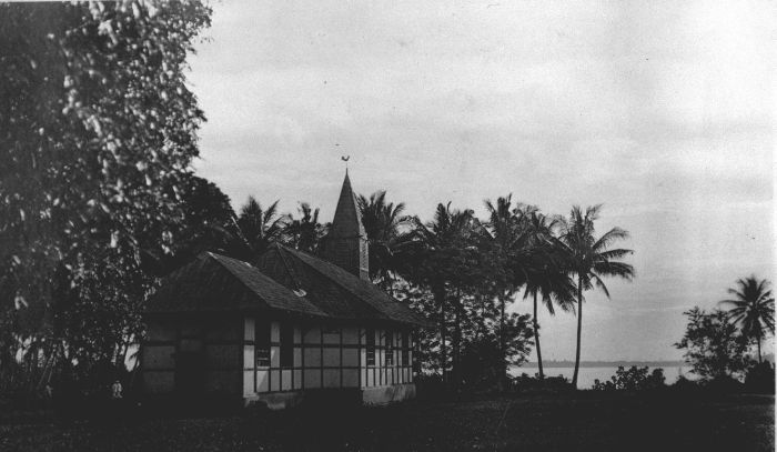 Foto. Een protestantse kerk in Tobelo